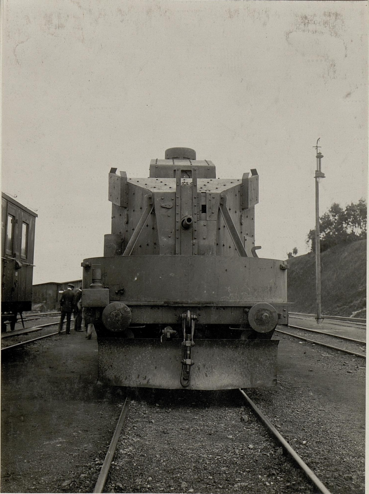 Ein mit Schnellfeuergeschützen und Maschinengewehren ausgerüsteter Panzerzug der k.u.k. Staatsbahnen bei Zborow, Juni 1916